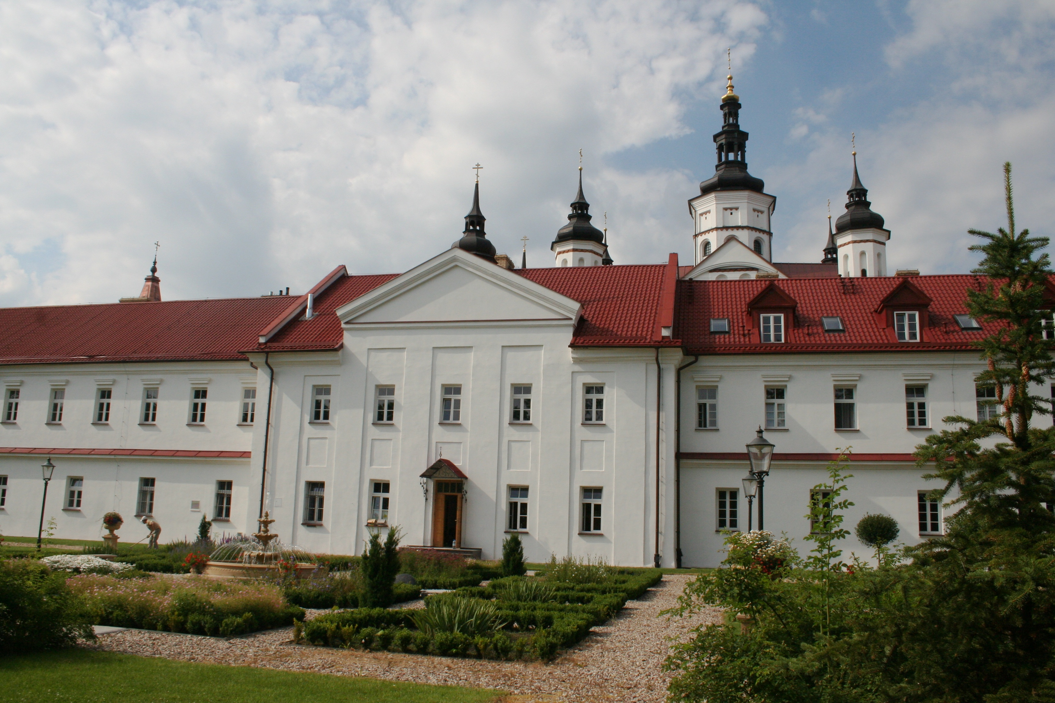 Fragment klasztoru w Supraślu.